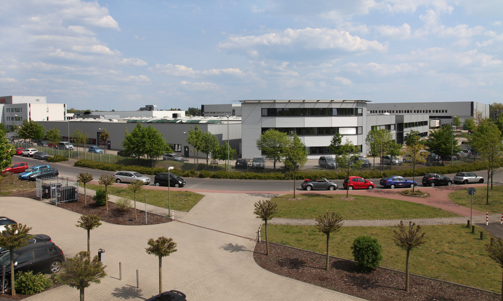 Das Gebäude der Hager & Meisinger GmbH in Neuss